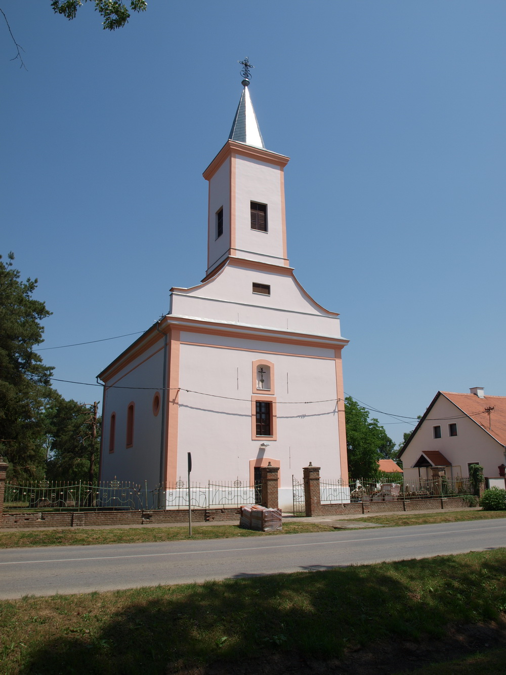 Crkva Sv. Marka u Trnjanima, Brodsko-posavska županija.